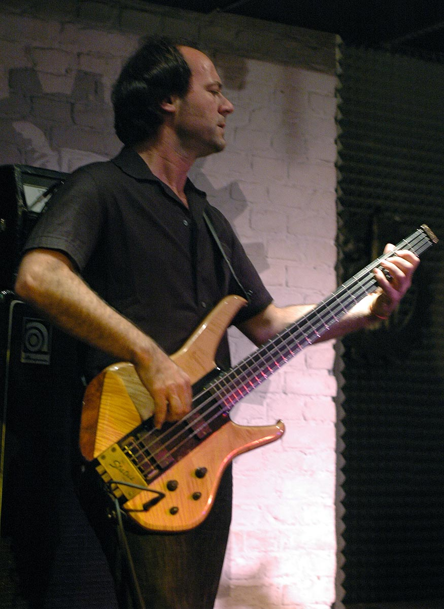 Marino Pliakas c/o Peter Brötzmann & friends im Schlot Peter Brötzmann (reeds), Mats Gustafsson (reeds), Ken Vandermark (reeds), Conrad Bauer (tb), Johannes Bauer (tb), Marino Pliakas (e-b), Clayton Thomas (b), Michael Wertmüller (dr) ... Party parallel zum Jazzfest, in Kooperation mit der jazzwerkstatt-berlin-brandenburg e.V. und Ulli Blobel